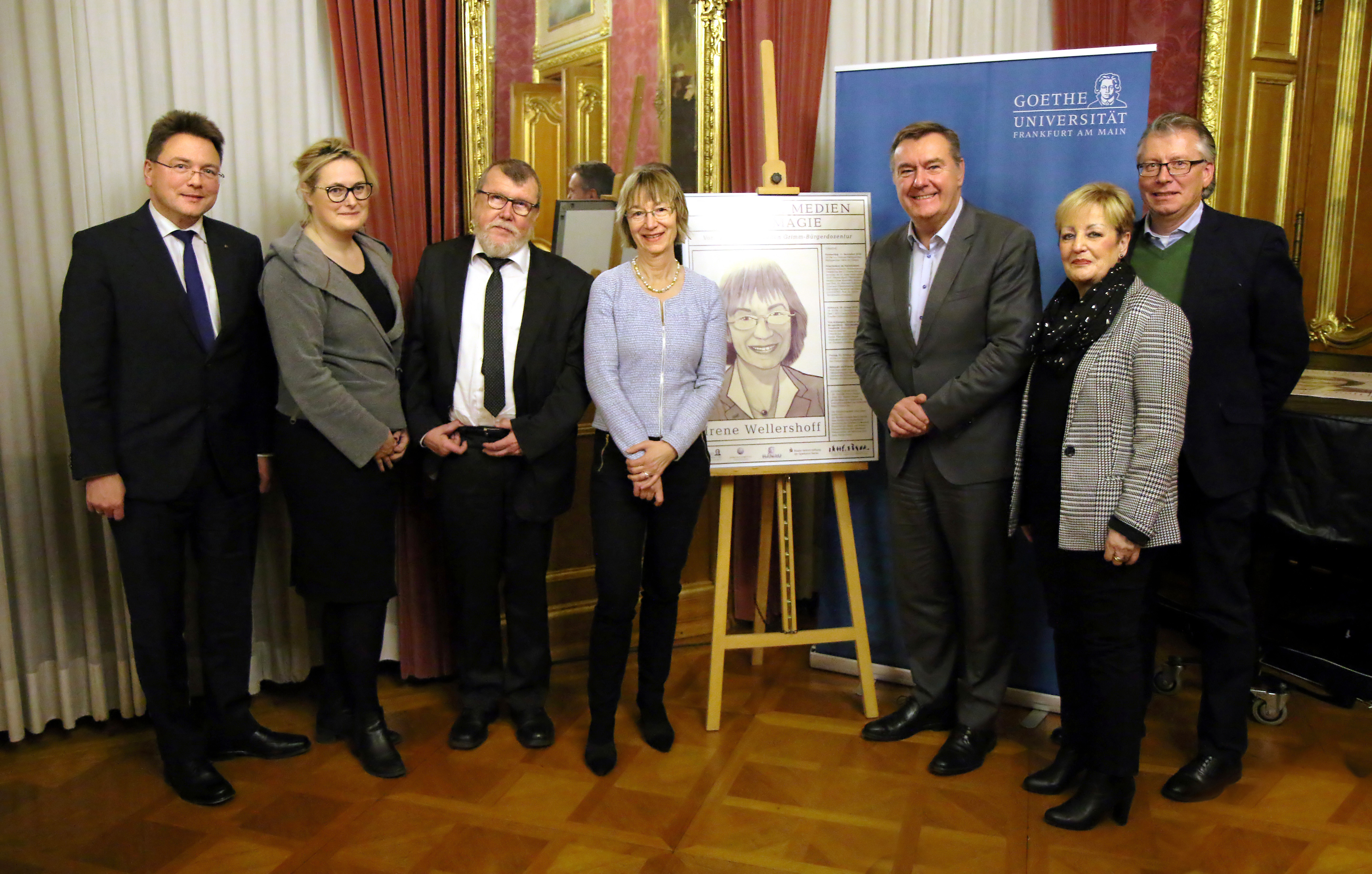 Überreichung der Auszeichnung "Grimm Bürgerdozentur" der Stadt Hanau und der Universität Frankfurt an die ZDF-Redaktionsleiterin und Autorin Dr. Irene Welleshoff (4.v.l.) am 13. Dezember 2018 im Schloss Philippsruhe in Hanau. Auf dem Foto v.l.n.r.: Nils Galle (Förderer, Vorstandsmitglied der Stiftung der Sparkasse Hanau), Dr. Claudia Maria Pecher (Initiatorin des Preises, Universität Frankfurt), Prof. Dr. Dieter Wiedemann (ehemaliger Rektor der Hochschule für Film und Fernsehen Konrad Wolf, Laudator), Dr. Irene Wellershoff (Preisträgerin), Claus Kaminsky (Oberbürgermeister Hanau) Beate Funck (Stadtverordnetenvorsteherin Hanau), Martin Hoppe (Initiator des Preises, Stadt Hanau)